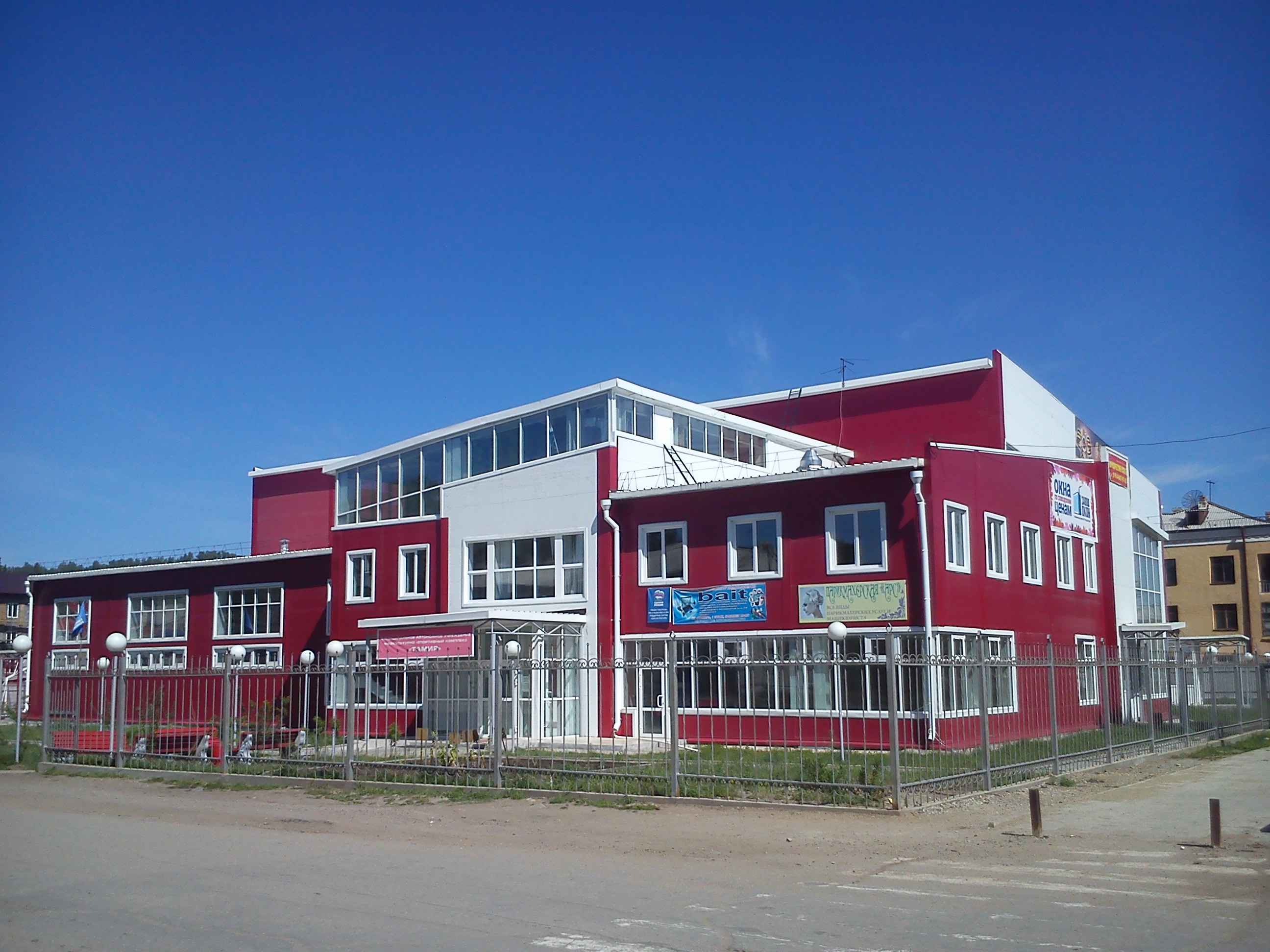 Спорткомплекс Тамир в городе Закаменск.